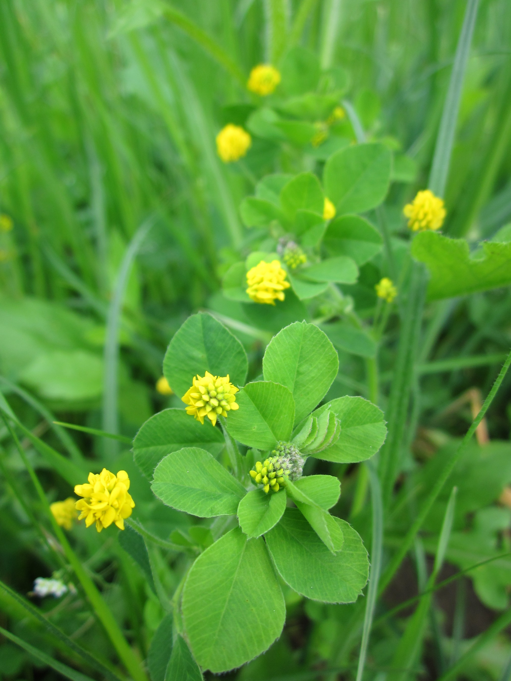 Hopfenklee (Medicago lupulina) am Staden in Saarbrücken